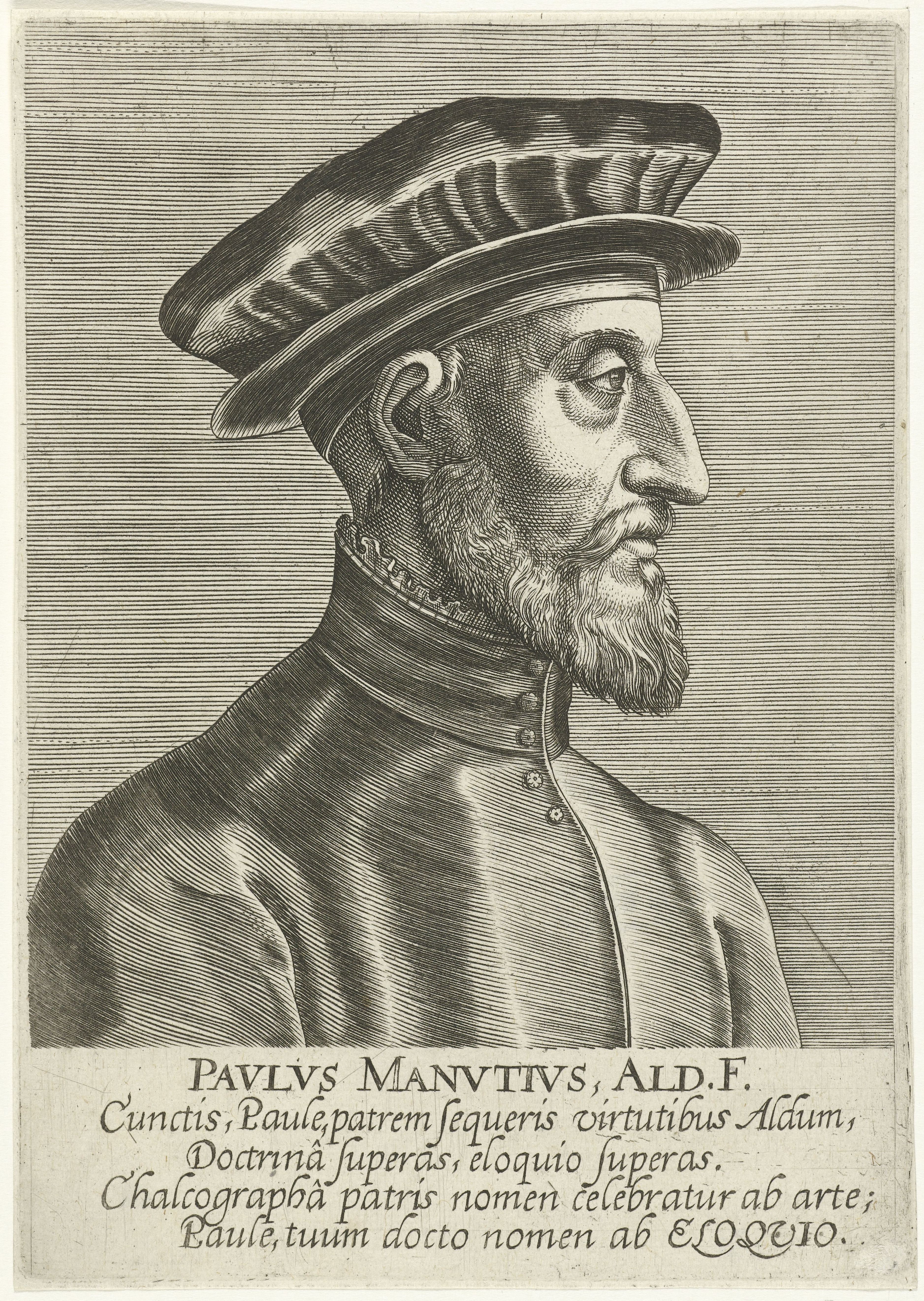 IdentificatieTitel(s): Portret van Paolo ManuzioPavlvs Manvtivs, Ald. F. (titel op object)Portretten van beroemde geleerden (serietitel)Imagines L. Doctorum Virorum (serietitel)Objecttype: prent Objectnummer: RP-P-1909-1070Catalogusreferentie: New Hollstein Dutch 647Opschriften / Merken: verzamelaarsmerk, verso midden onder, gestempeld: Lugt 2228Omschrijving: Portret van Paolo Manuzio, Italiaanse humanist en uitgever. In profiel naar links. De prent heeft een Latijns onderschrift en maakt deel uit van een serie van beroemde geleerdenVervaardigingVervaardiger: prentmaker: Philips Gallenaar prent van: Martino Rotaschrijver: Franciscus Raphelengius (I)uitgever: Philips Galle (mogelijk)uitgever: Theodoor Galle (mogelijk)Plaats vervaardiging: AntwerpenDatering: 1587 - 1606Fysieke kenmerken: gravureMateriaal: papier Techniek: graveren (drukprocedé)Afmetingen: plaatrand: h 167 mm × b 120 mmOnderwerpWie: Paolo ManuzioVerwerving en rechtenVerwerving: aankoop 1909Copyright: Publiek domein